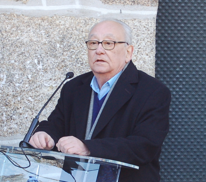 Xusto Beramendi na inauguración dos actos do Día das Letras Galegas 2019 na Casa natal de Antonio Fraguas en Insuela (Loureiro, Cotobade)